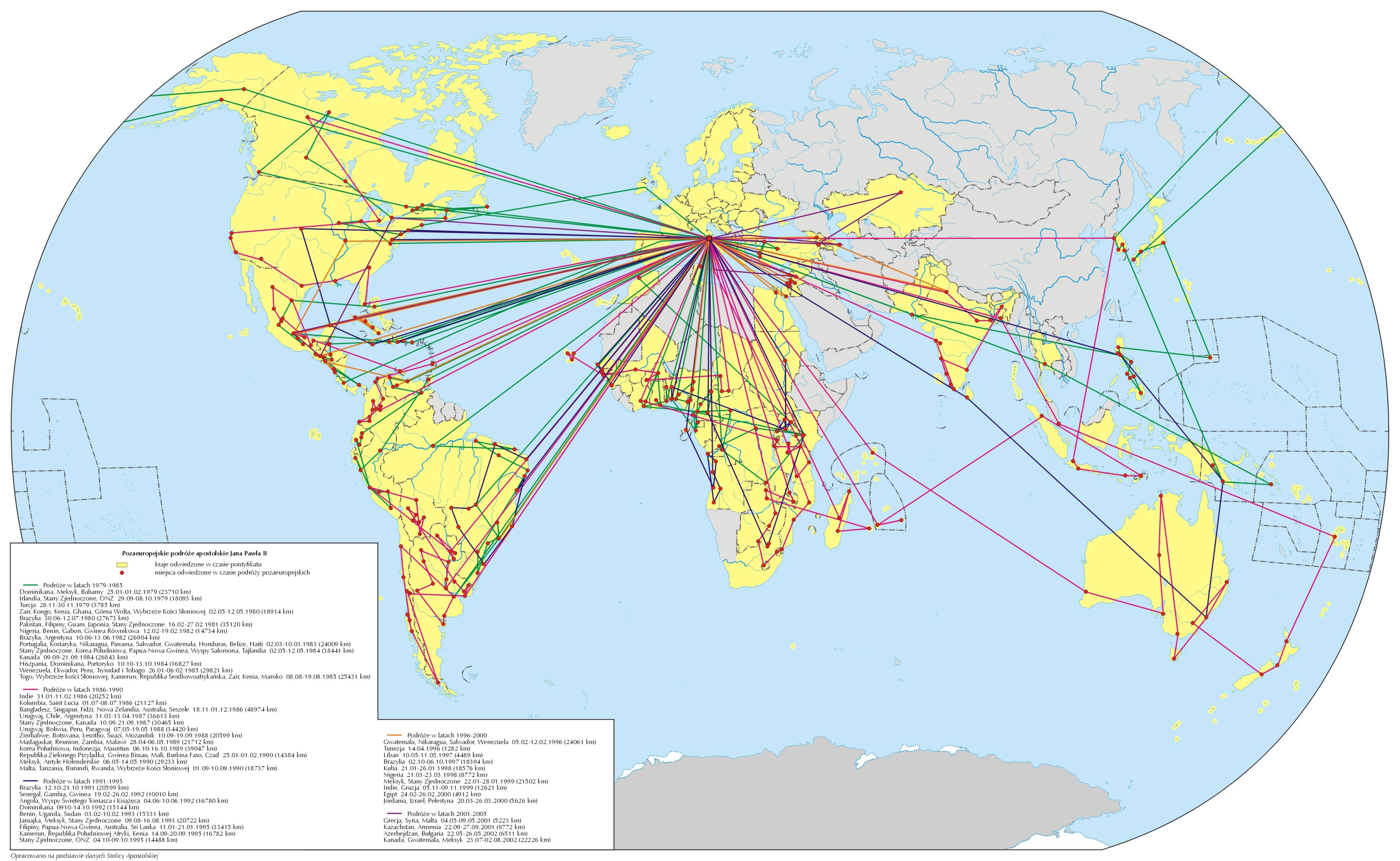 Mapa przedstawiająca trasy pozaeuropejskich podróży apostolskich Jana Pawła II. Autor Aotearoa